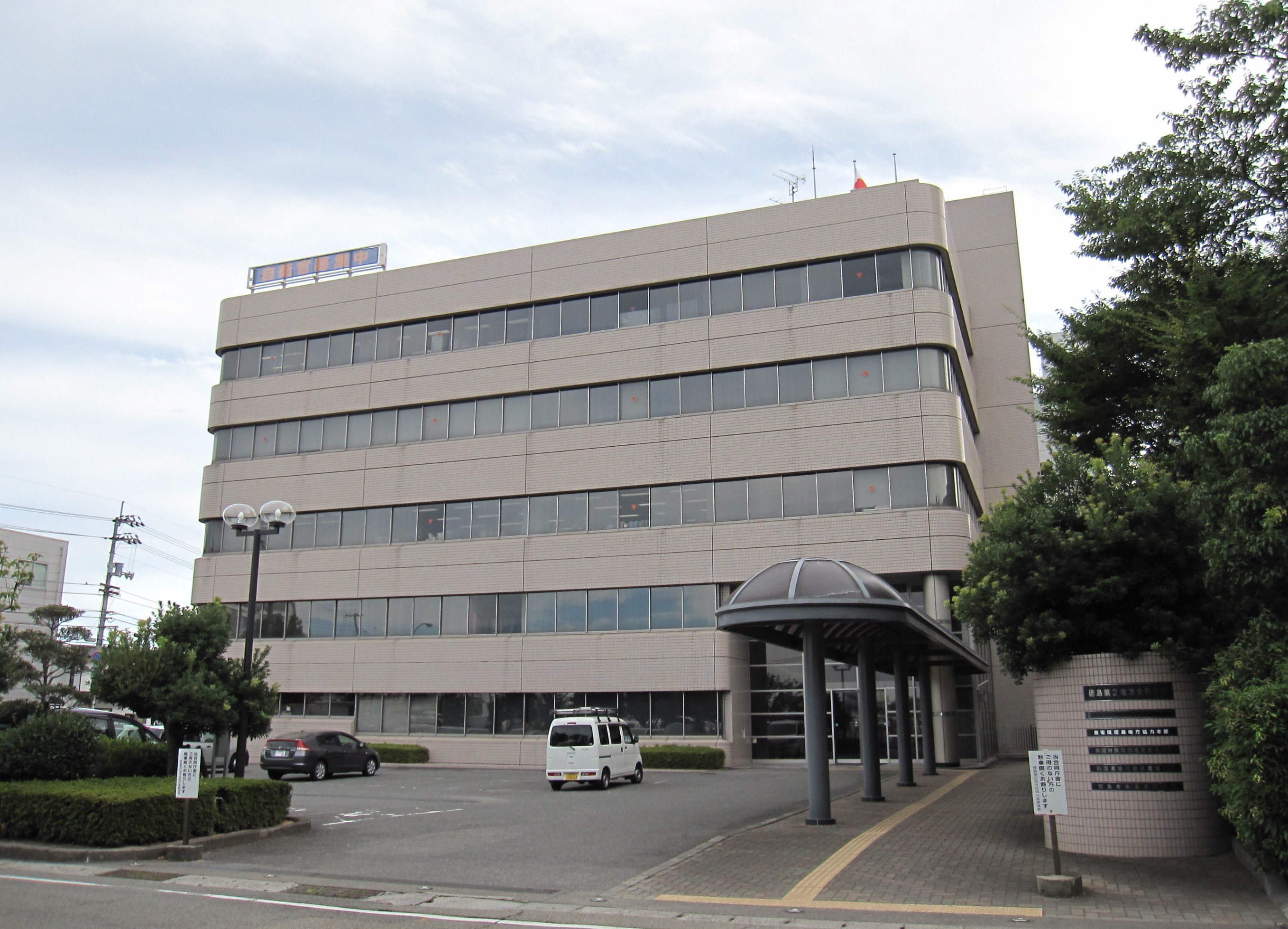 徳島第2地方合同庁舎。自衛隊徳島地方協力本部、徳島財務事務所、徳島労働基準監督署、徳島運輸支局本庁舎、四国厚生支局徳島事務所が入居。